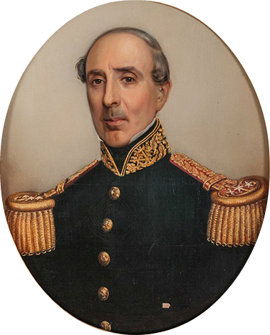 Manuel Blanco Encalada